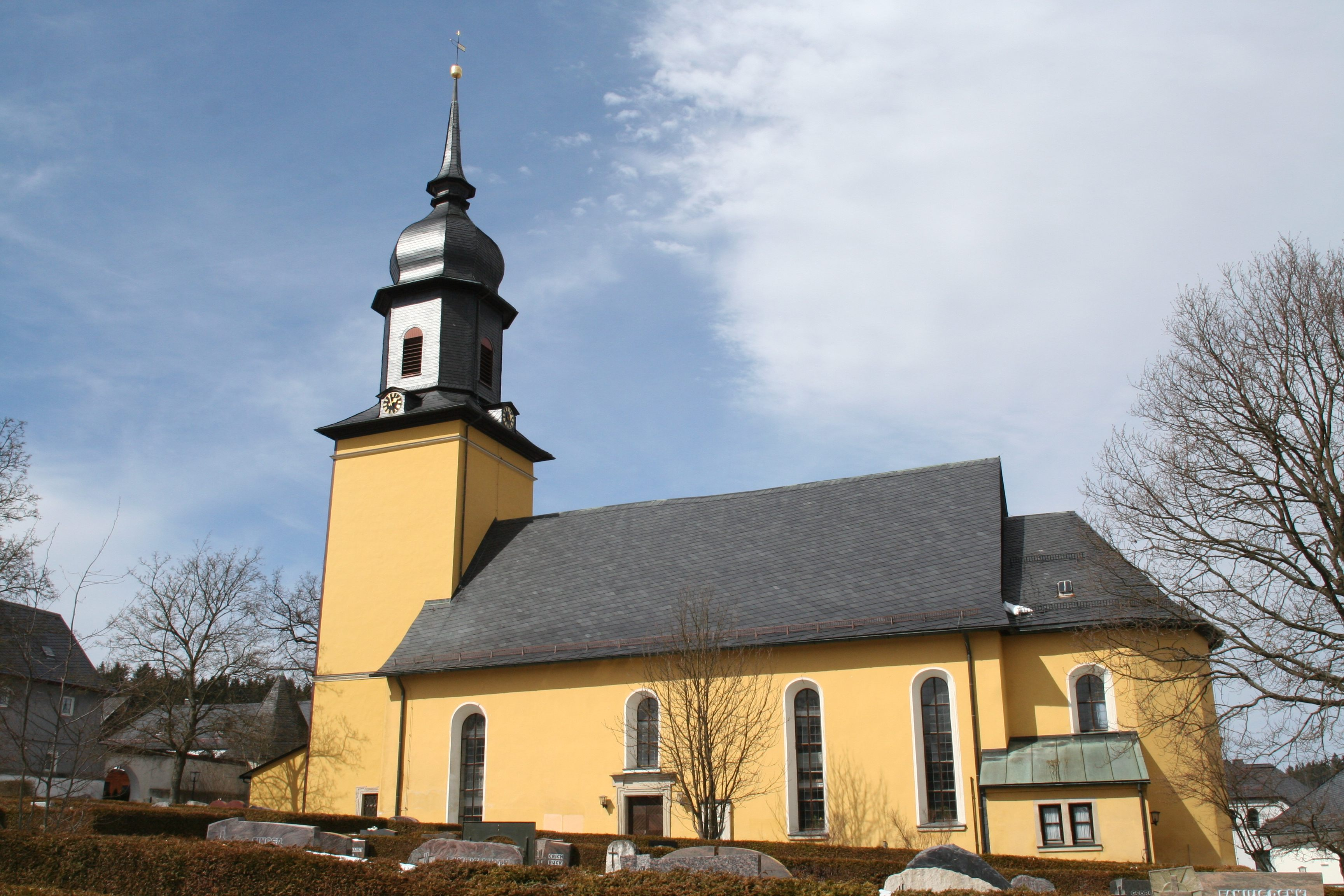 Geroldsgrün im Landkreis Hof, evangelische Jakobuskirche